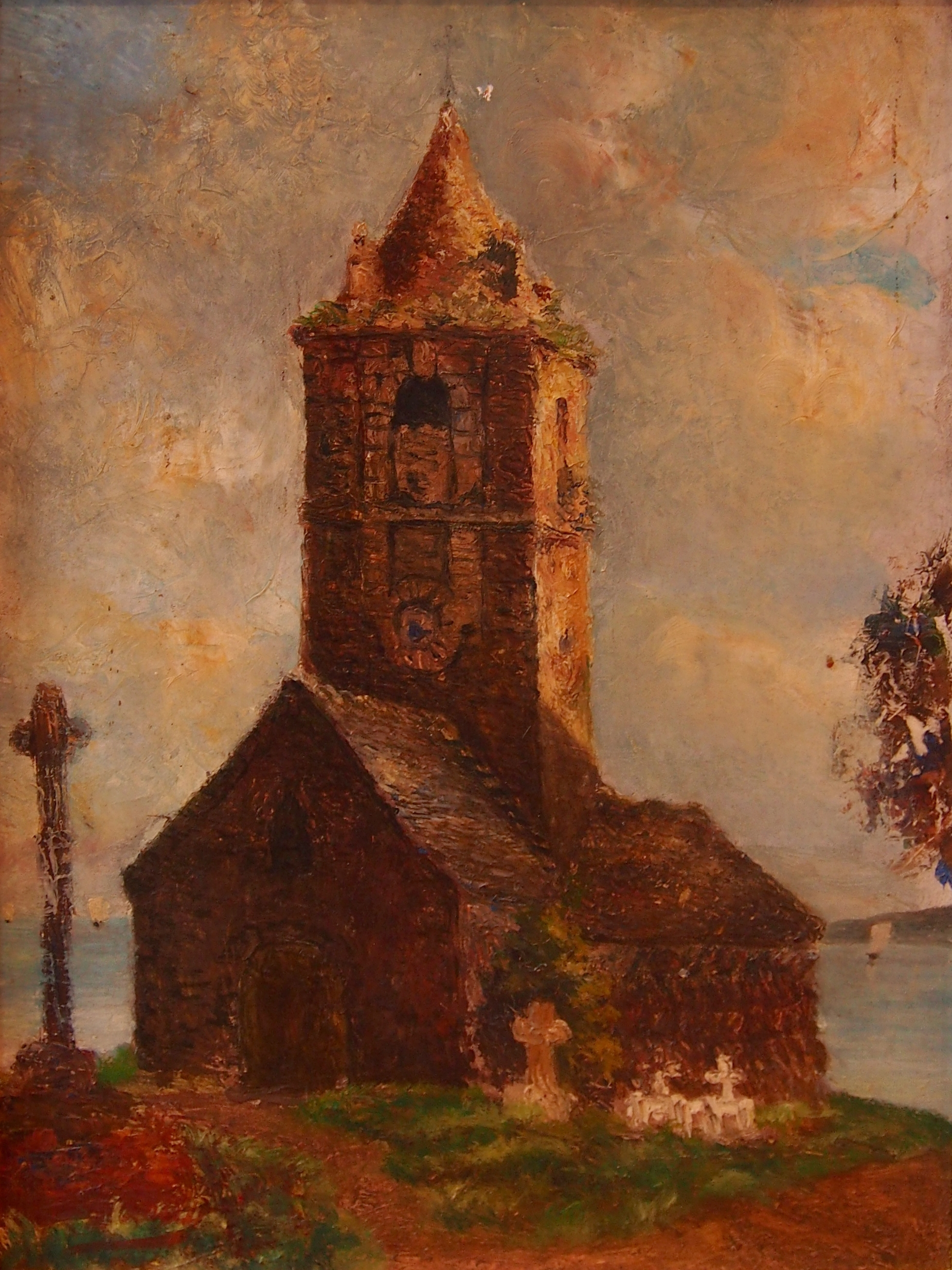 La Chapelle de Querqueville par François Énault (musée Quesnel-Morinière, Coutances, Normandie, France).